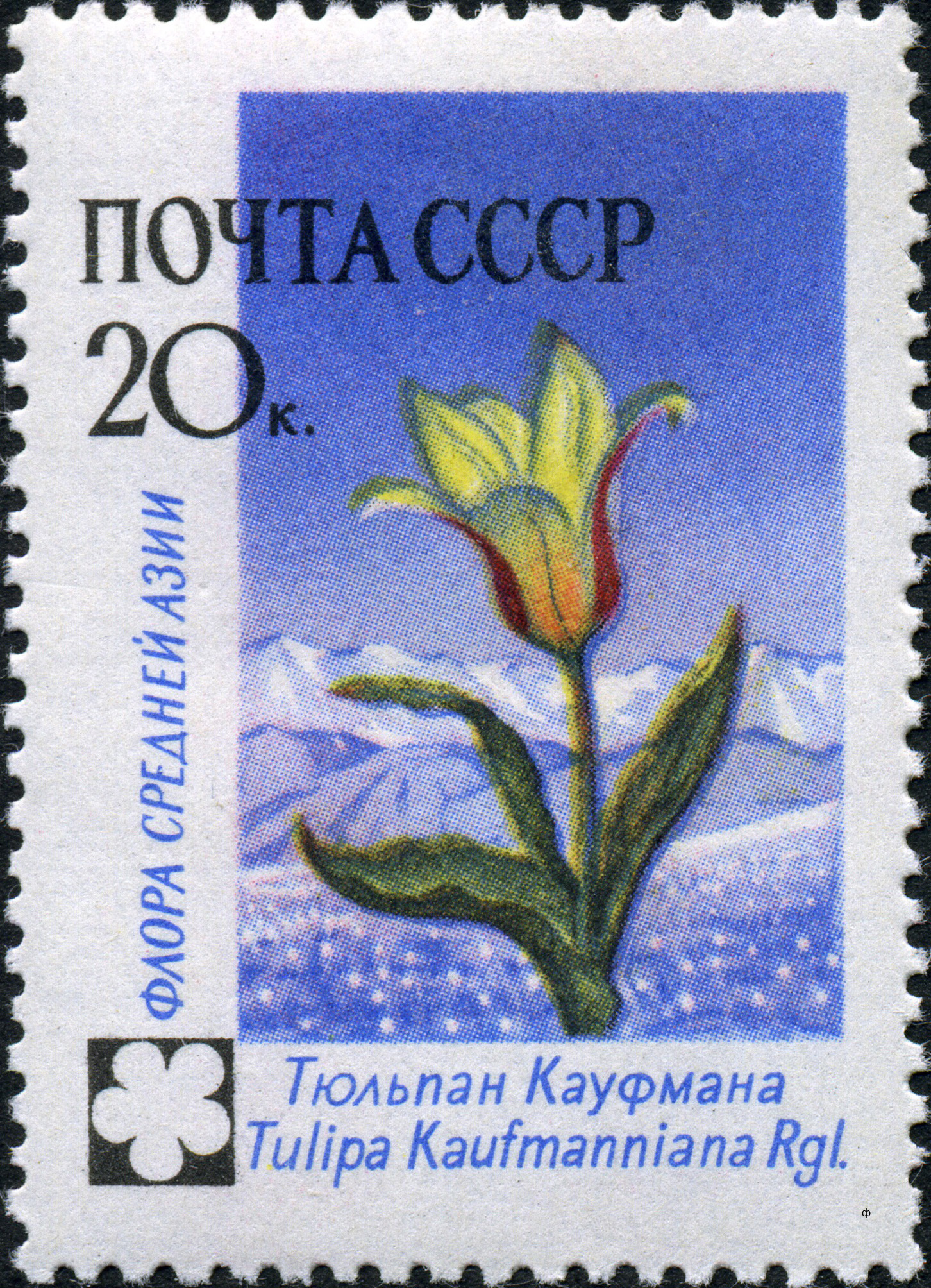 Марка СССР